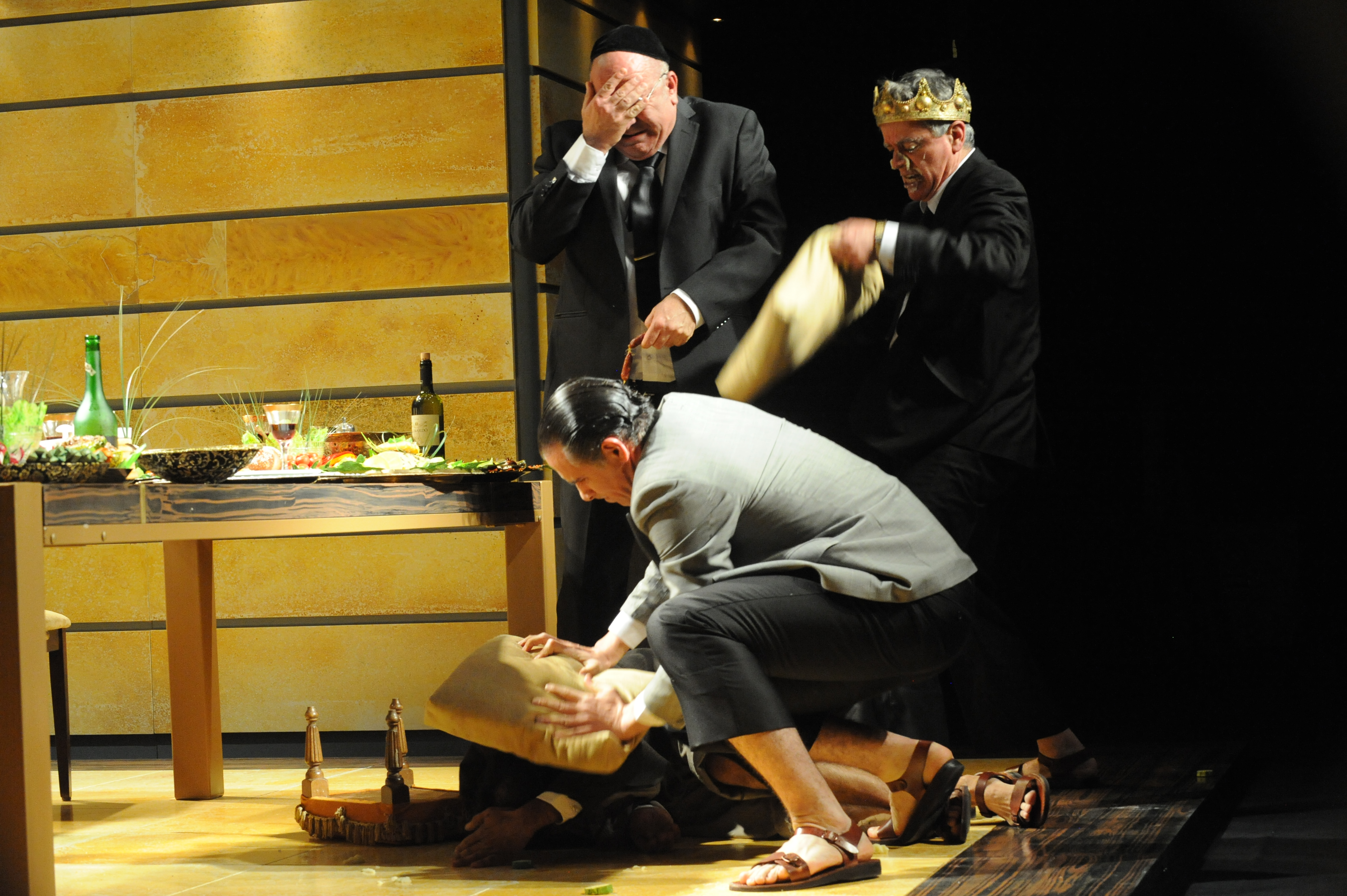 ההצגה "אוכלים" בבימויו של מיקי גורביץ', תיאטרון החאן, 2011